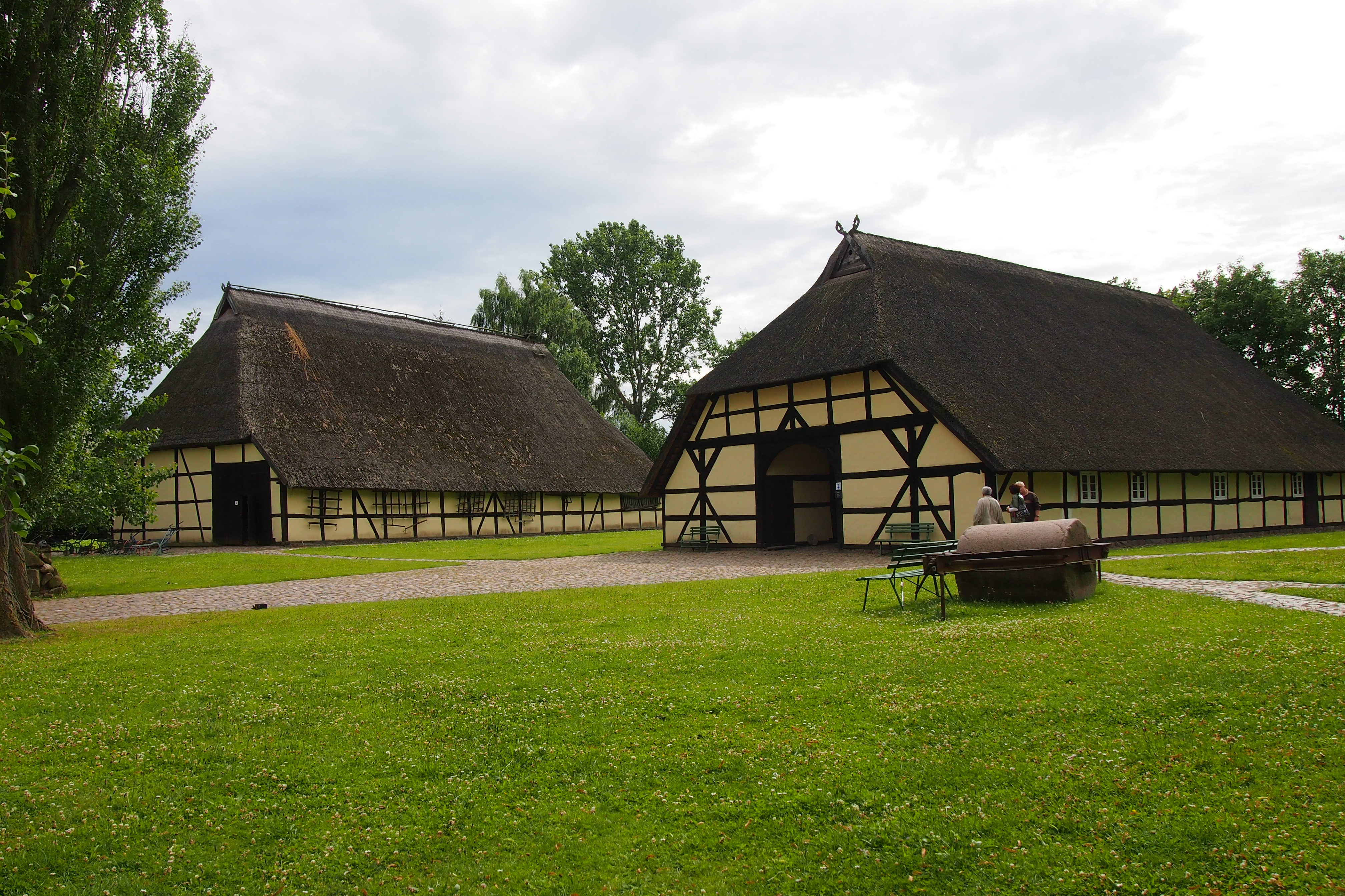 Scheune und Bauernhaus der Freilichtanlage